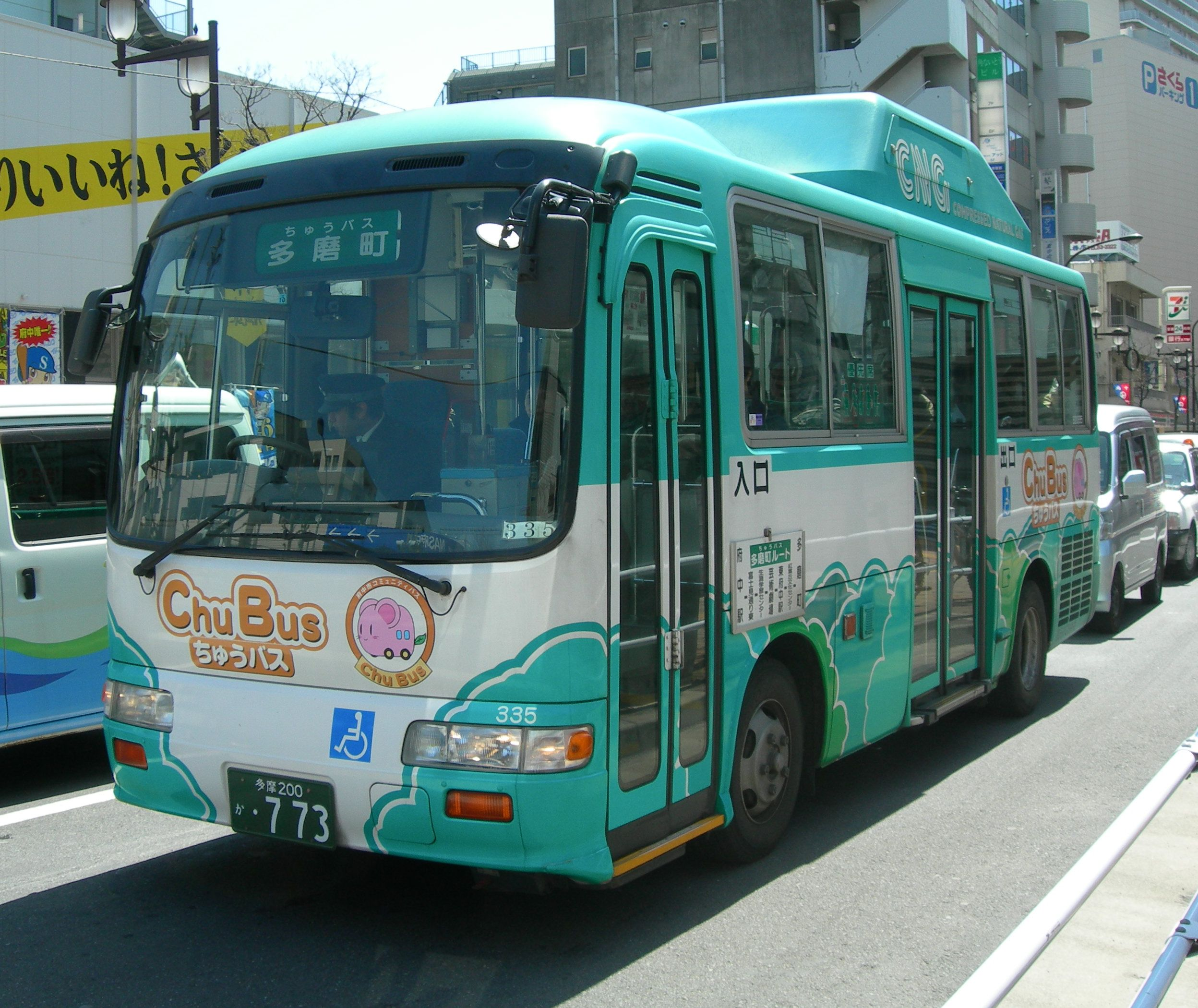 ちゅうバス（東京都府中市のコミュニティバス）